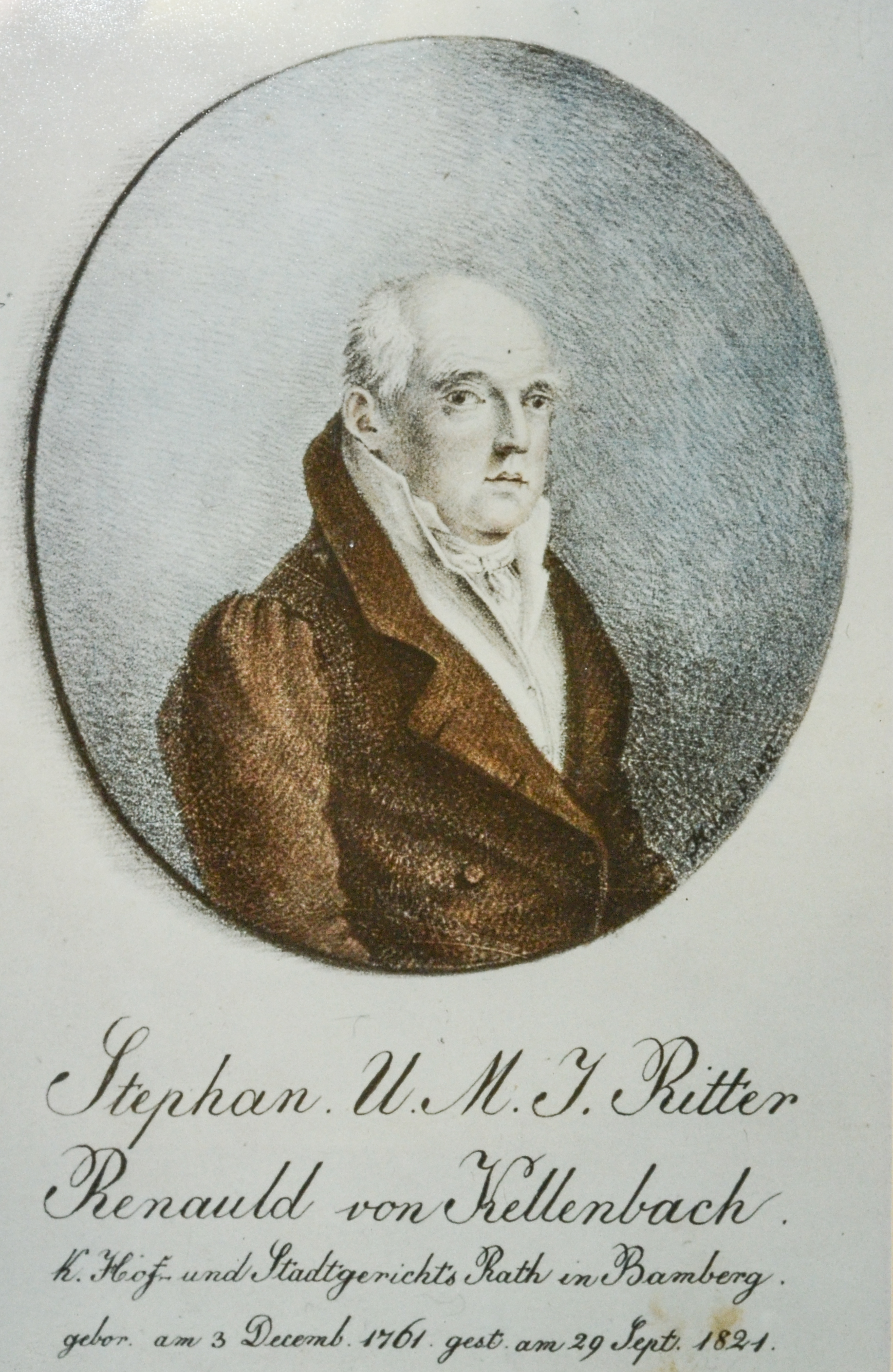 Lithografie Stephan Udalrich Maria von Renauld zeigend; Original im Staatsarchiv Bamberg